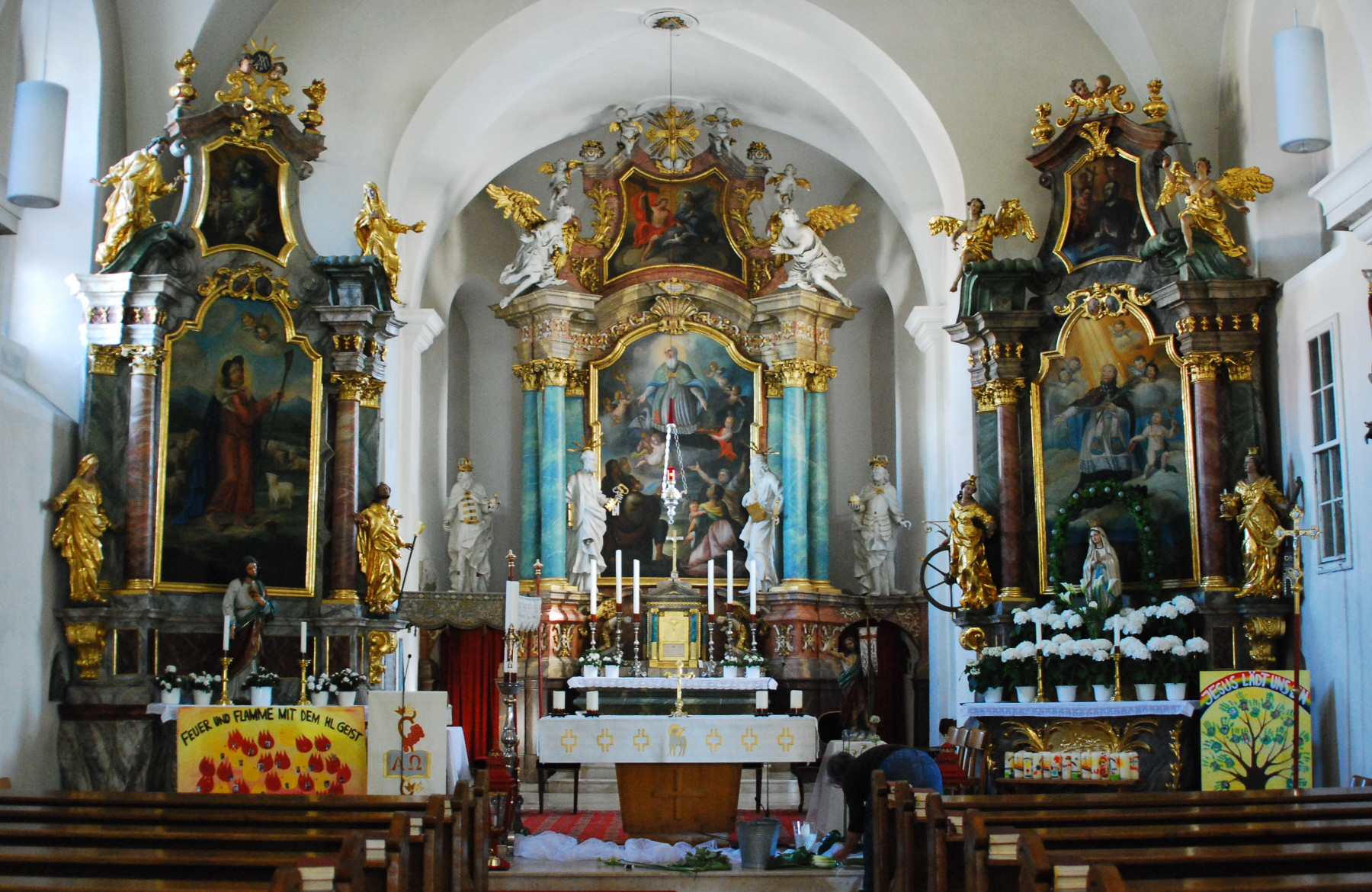 Altar in der Martinskirche in Mannersdorf an der Leitha in Niederösterreich